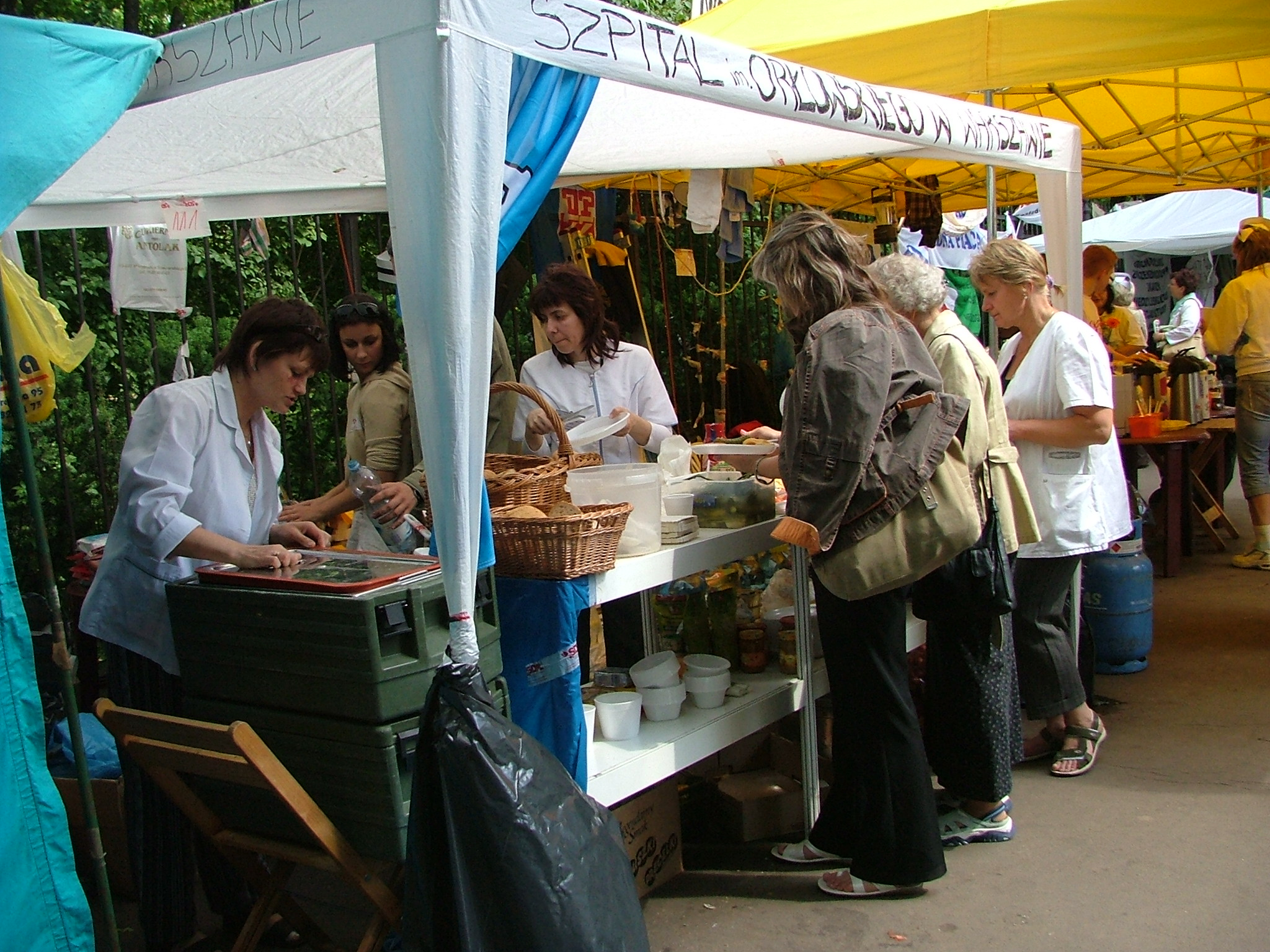 PL, Warsaw, Poland, Al. Ujazdowskie, Protest pielęgniarek